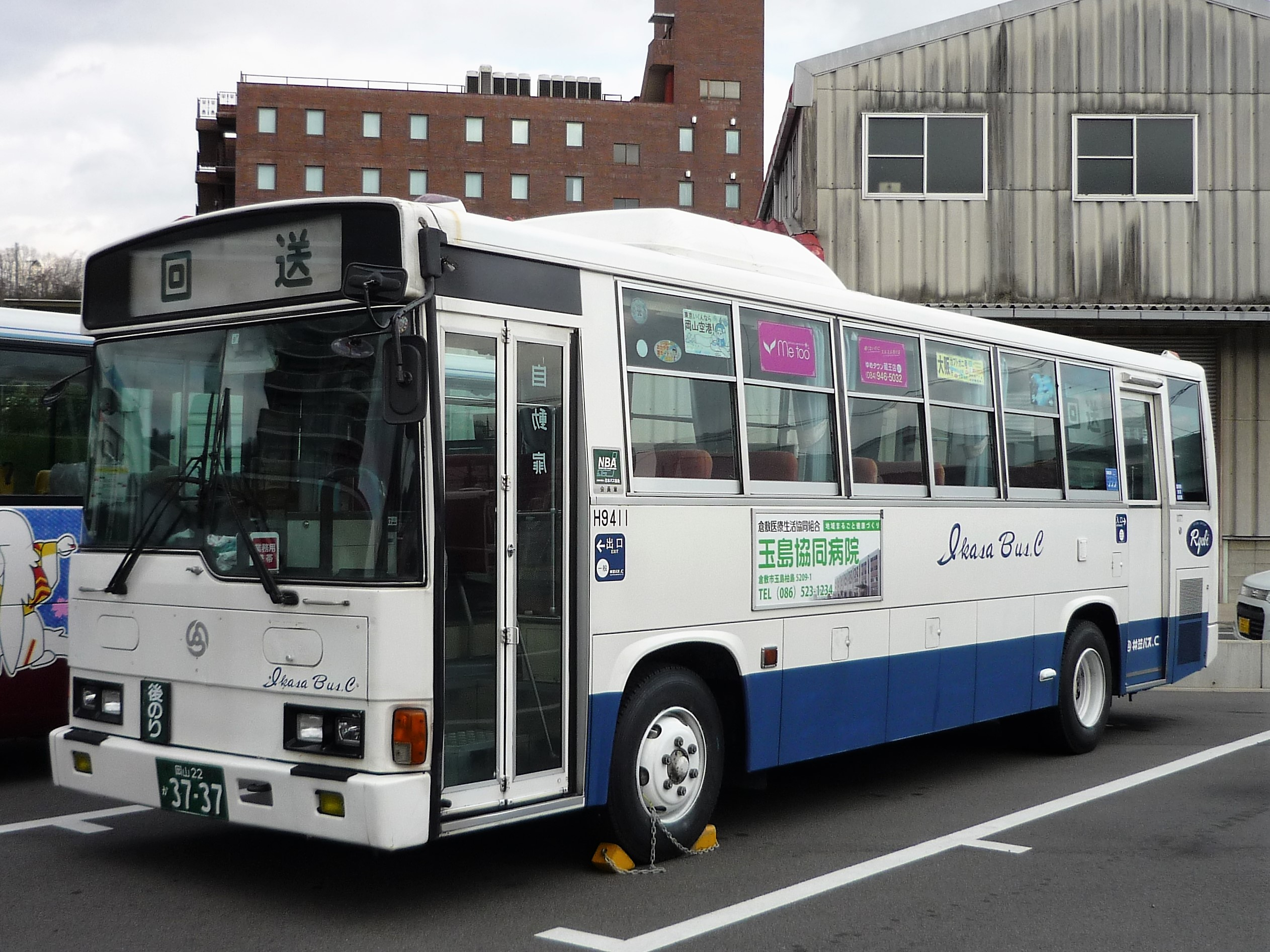 井原バスセンターに停車中の井笠バスカンパニーの車両